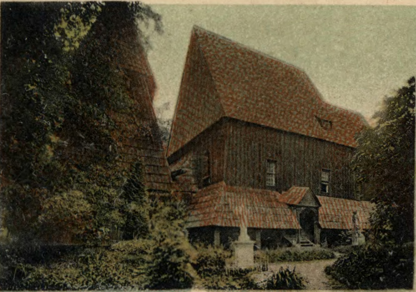 Nieistniejący drewniany kościół św. Jadwigi w Pszczynie, widok sprzed 1905 r. Wersja bez napisu.